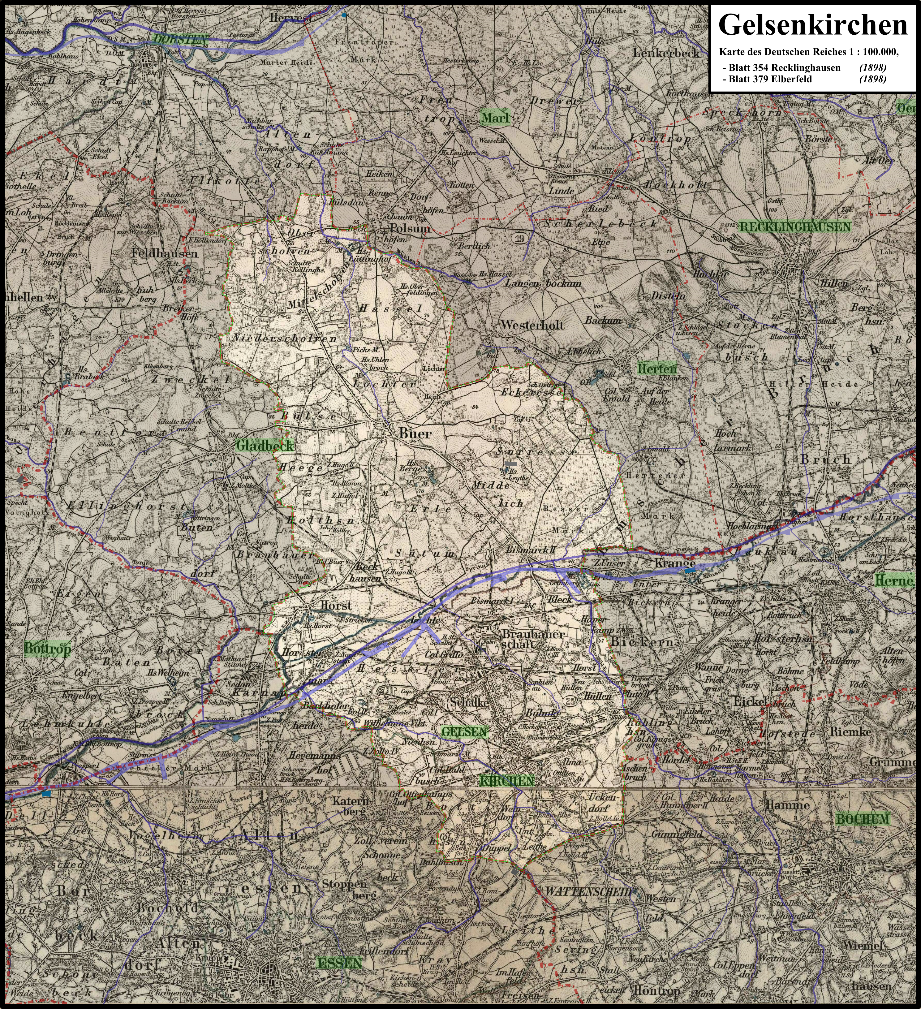 Karte der Stadt Gelsenkirchen auf Basis der Karte des Deutschen Reiches| 1 : 100.000, Ende des 19. Jahrhunderts;Verwaltungsgrenzen (rot), Kanäle, Flüsse und Seen entsprechen dem heutigen Stand/Verlauf; heutige Stadtnamen sind hellgrün hervorgehoben (damalige Stadtnamen in Großbuchstaben), aufgehellt und hellgrün umgrenzt ist die heutige Stadt Gelsenkirchen.